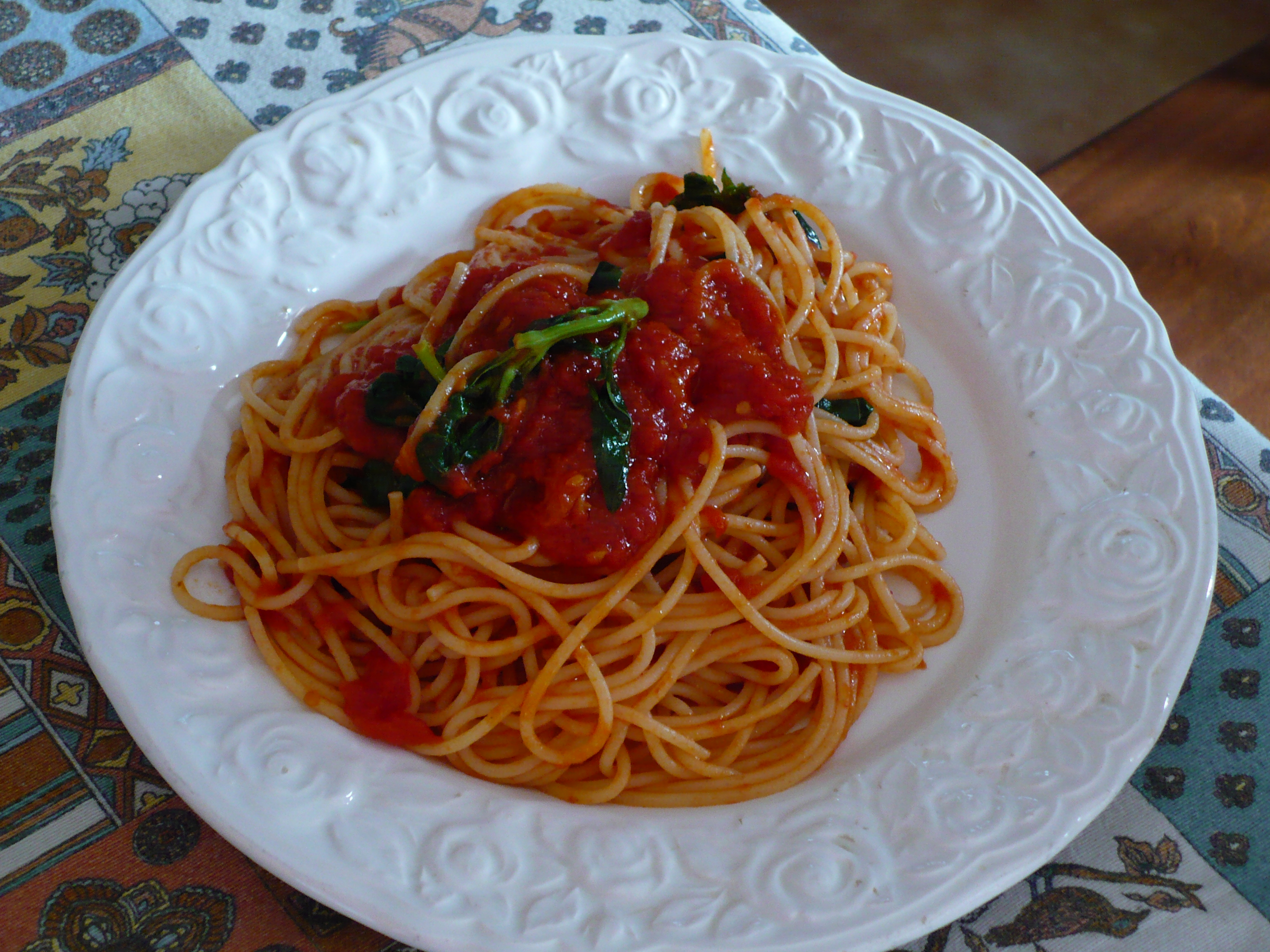 Spaghetti al pomodoro e basilico. Autore foto: Roberto De Martino